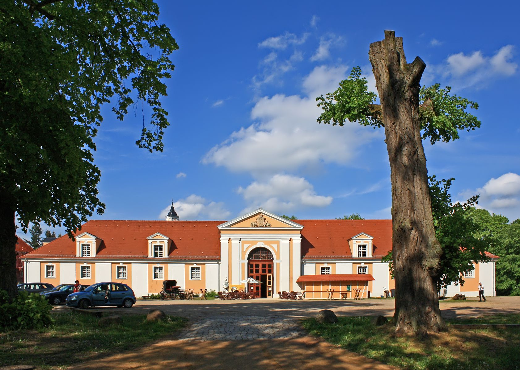 Marstall des Boitzenburger Schloßensembles